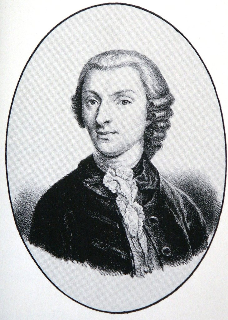 Johann Nikolaus Götz